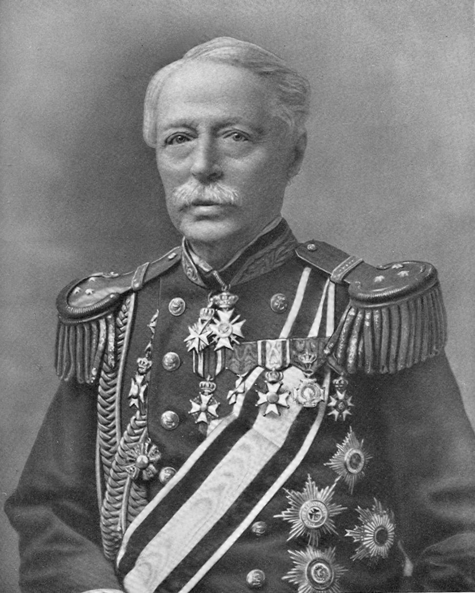 Jhr. de Casembroot, overleden in 1895